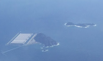 福岡県北九州市にある白島 白島国家石油備蓄基地